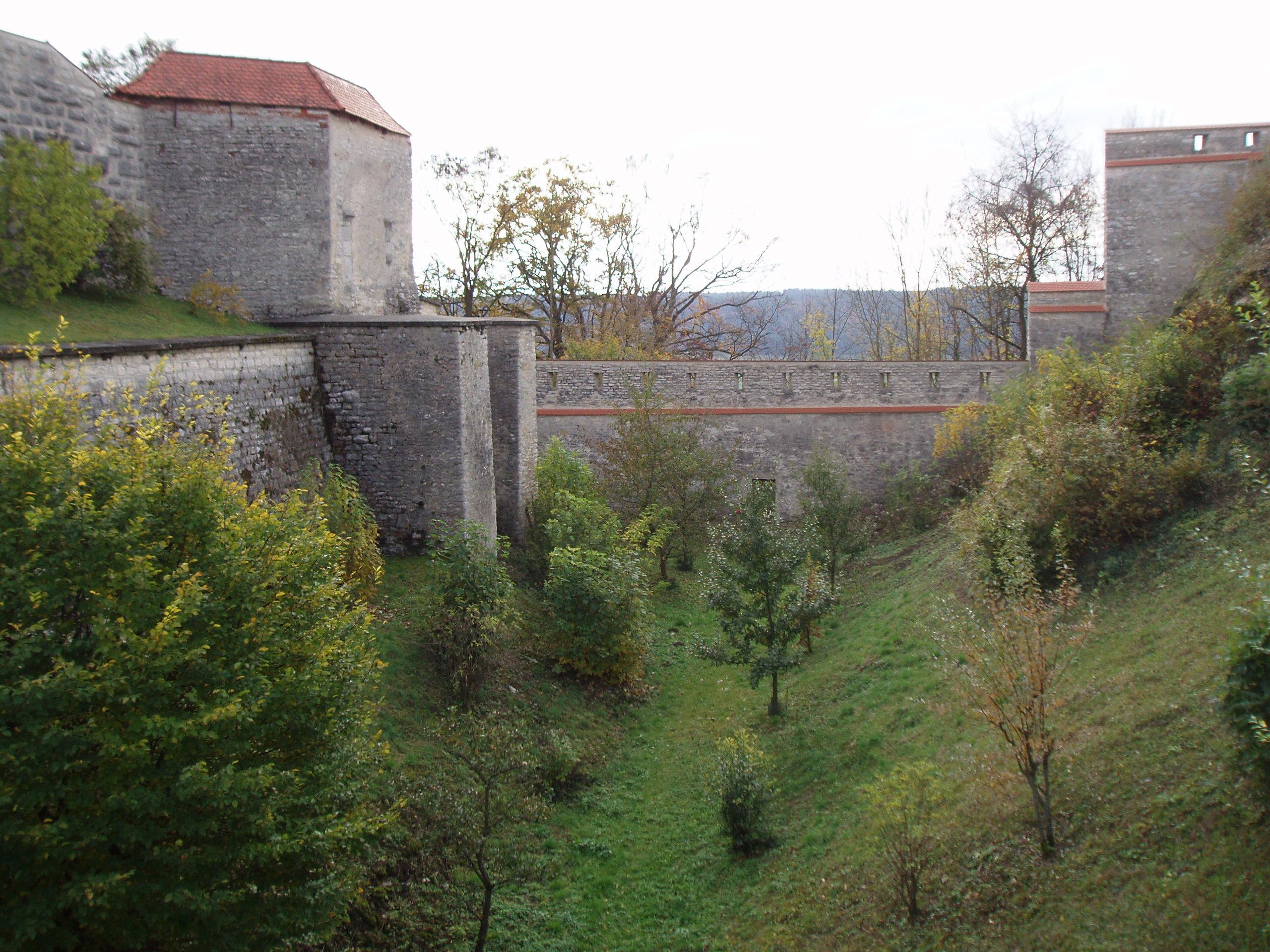 Schloss Hirchberg bei Beilngries, Burggraben